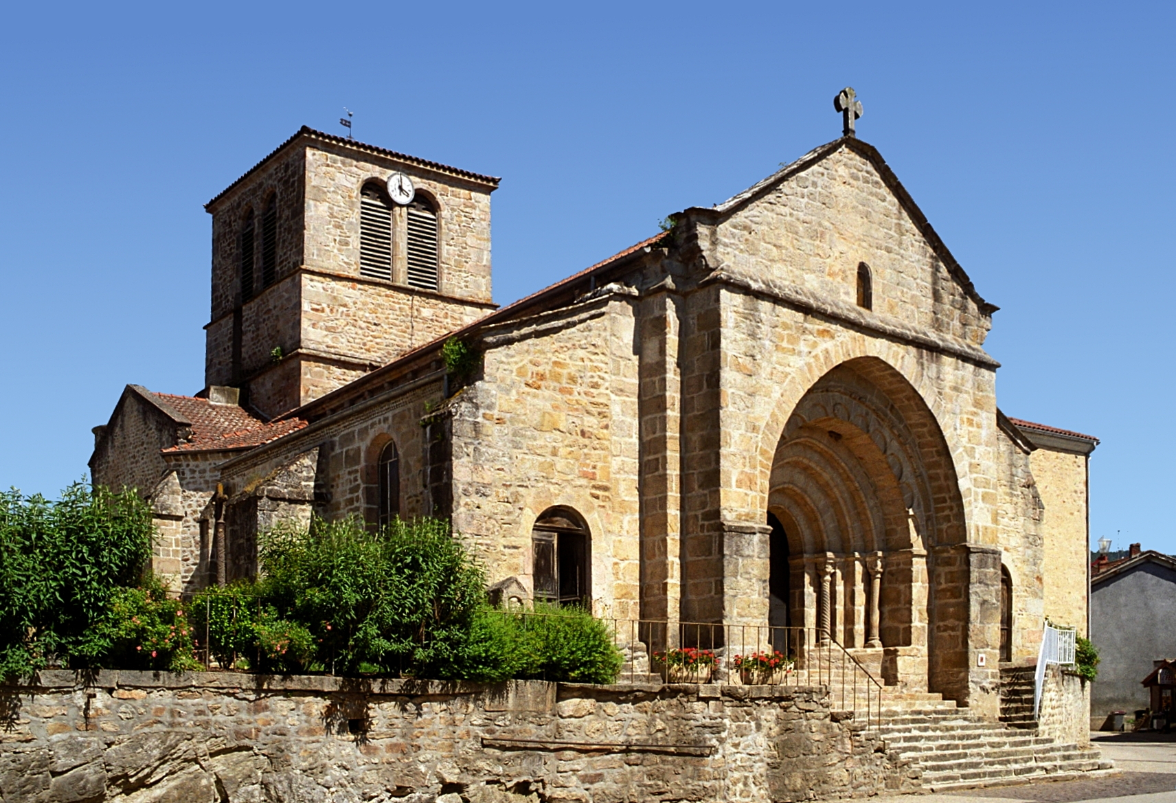 Dore_l'Eglise